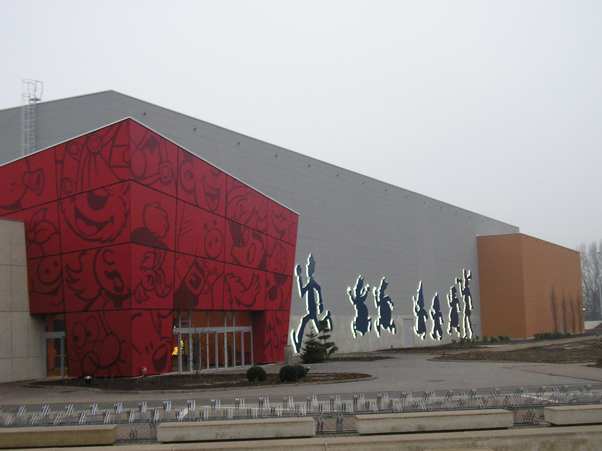 Het is een zelfgemaakte foto van de ingang van Plopsa Indoor. Deze foto komt te staan op de Plopsa Indoor Hasselt-pagina